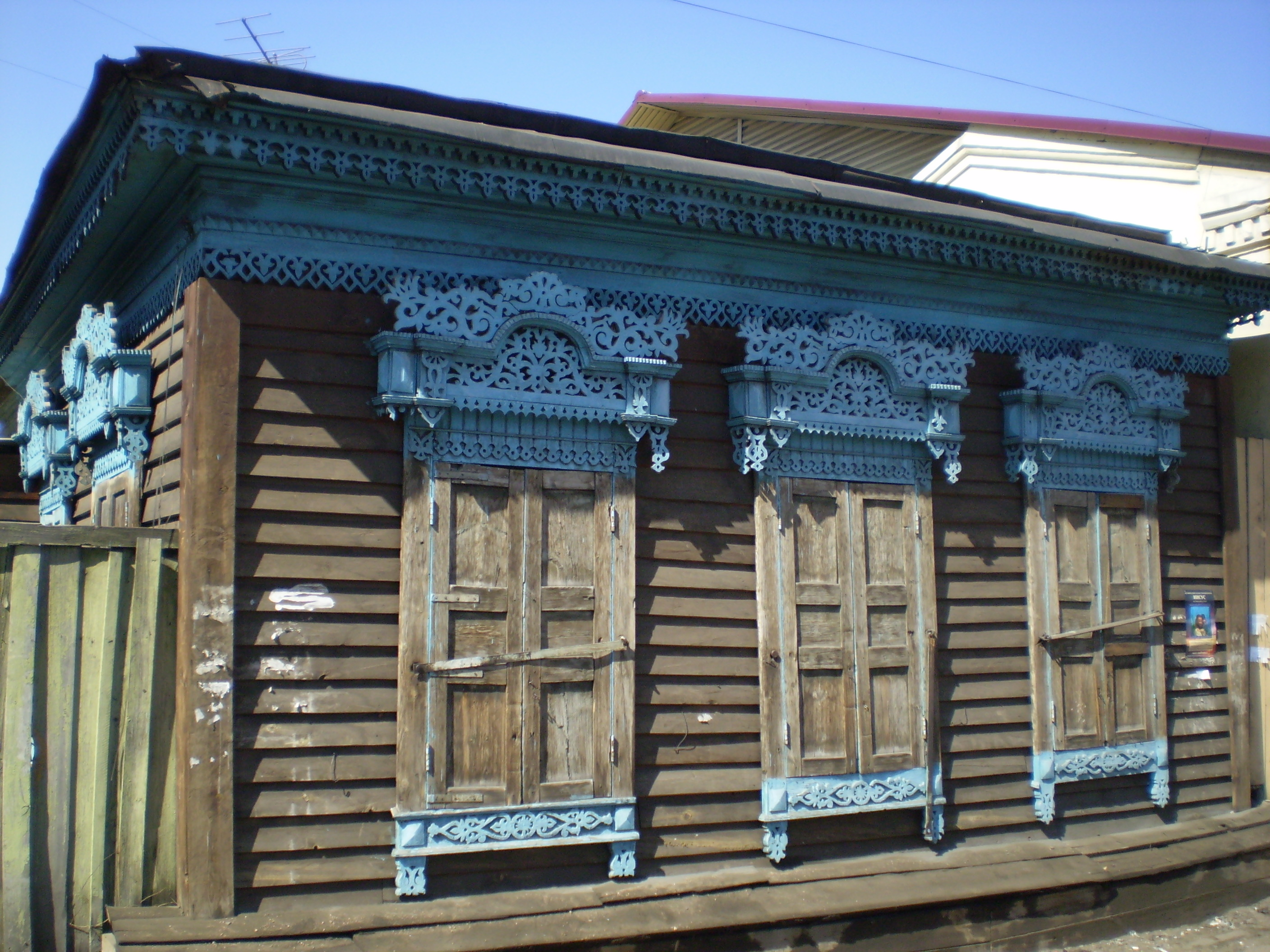 Усадьба крестьянина Г. И. Фиделя. Ул. Смолина, 35. Памятник архитектуры.